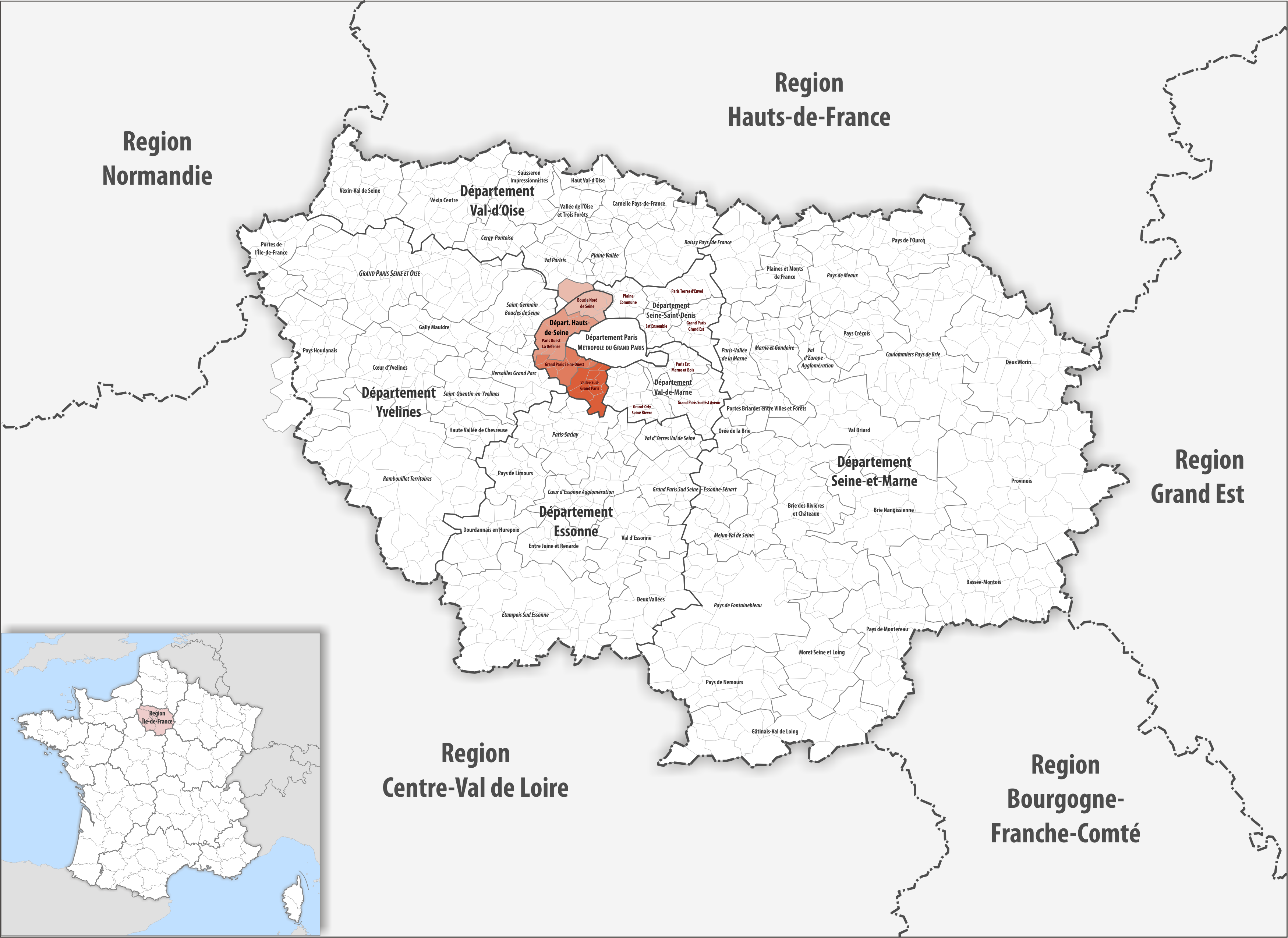 Gemeindeverbände im Département Hauts-de-Seine